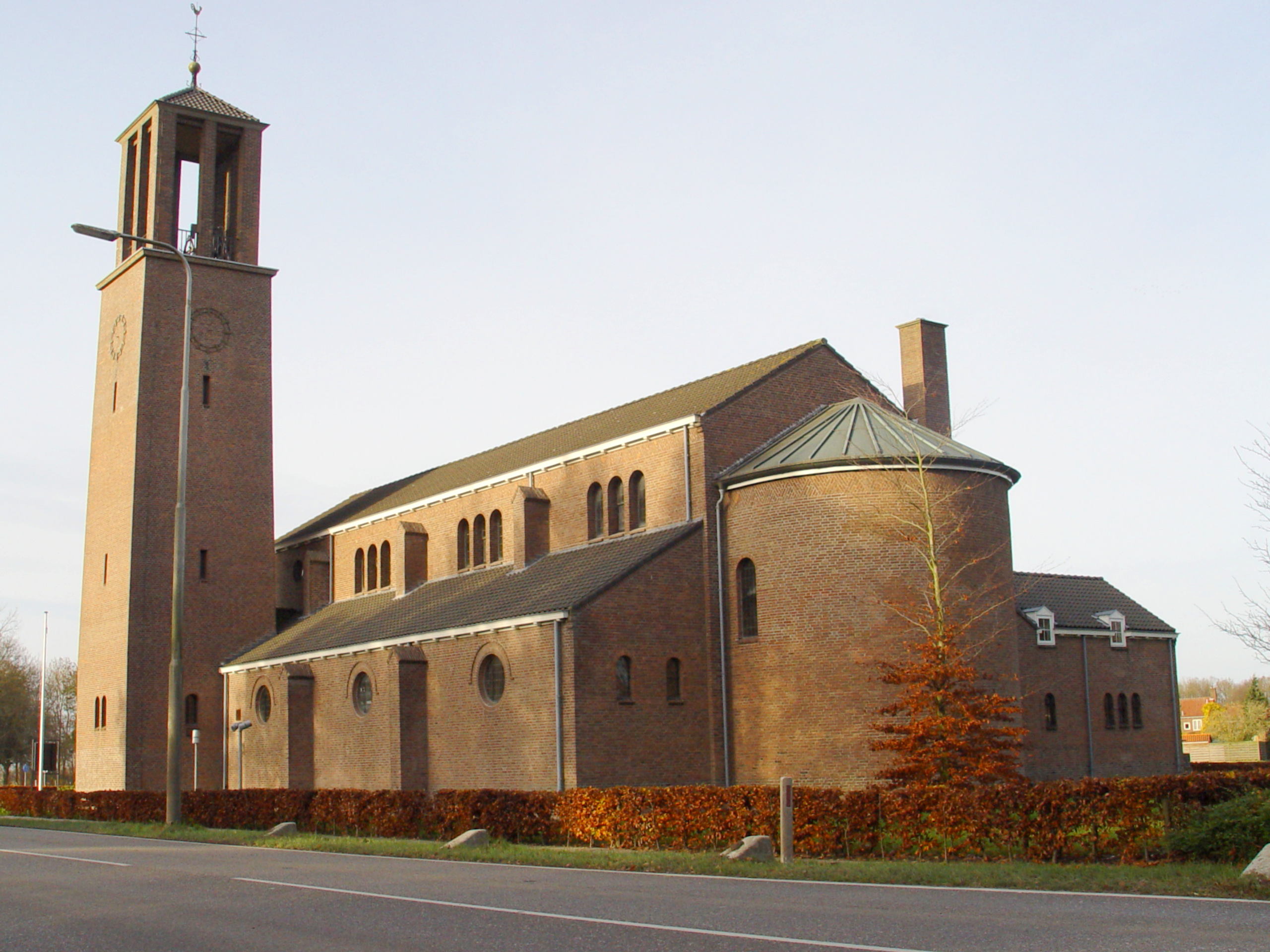 Bantsiliek in Bant (Noordoostpolder) - Zuidwend 2, 8314 AA Ban